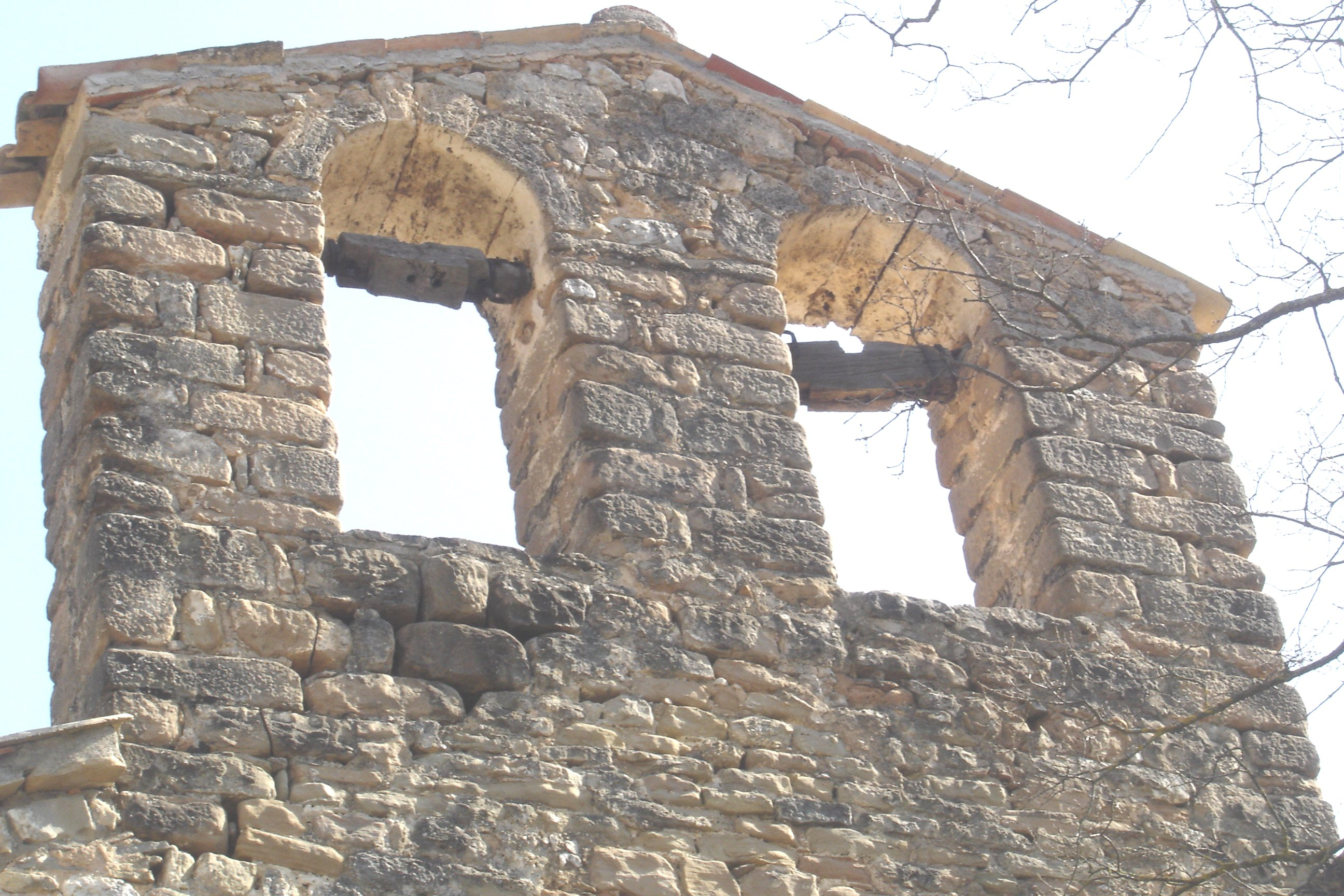 L'ermita de Sant Lleïr de Casabella, al municipi de La Coma i la Pedra, a la Vall de Lord (Solsonès). L'espadanya